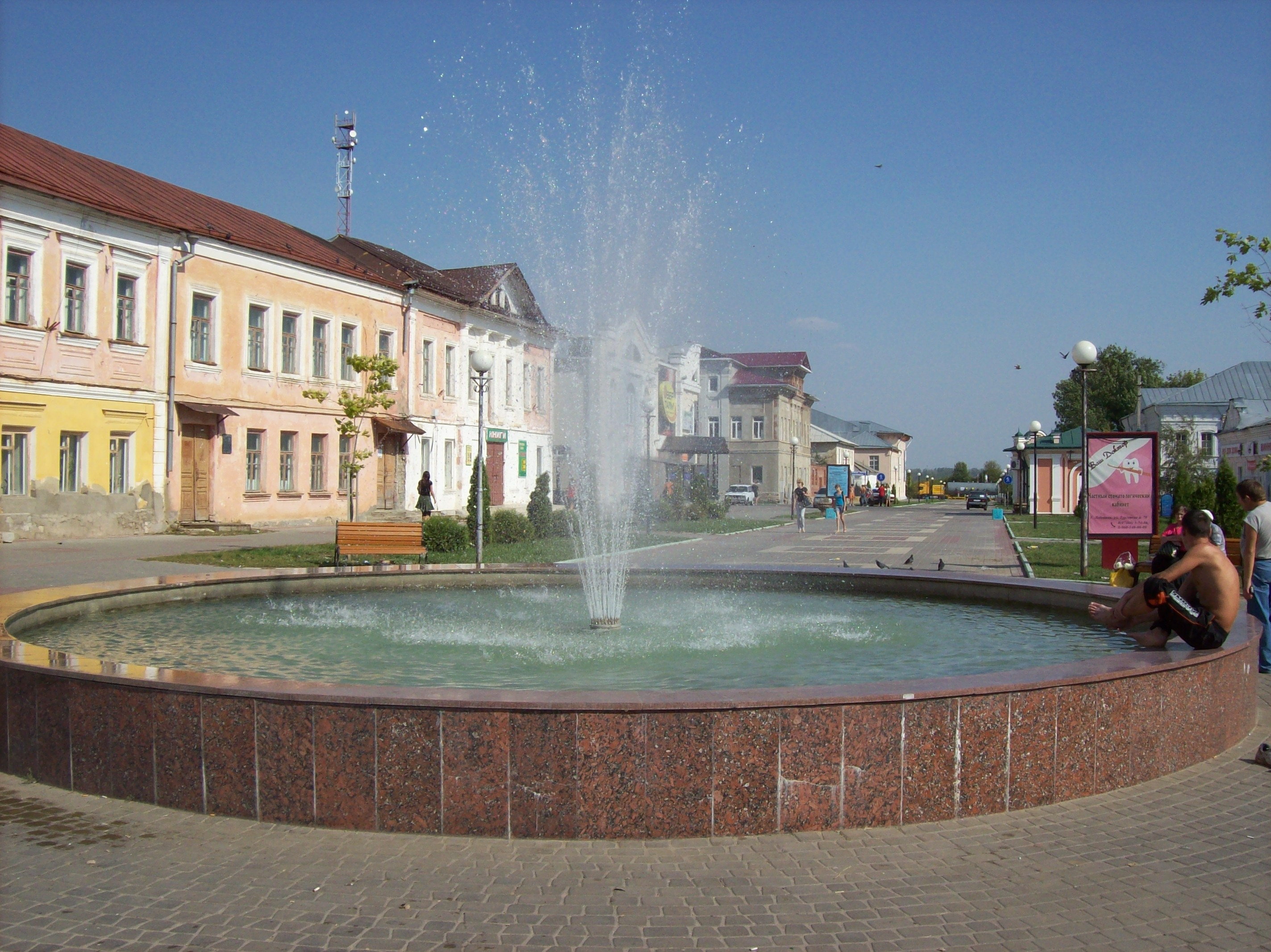 г.Лебедянь. Центр города